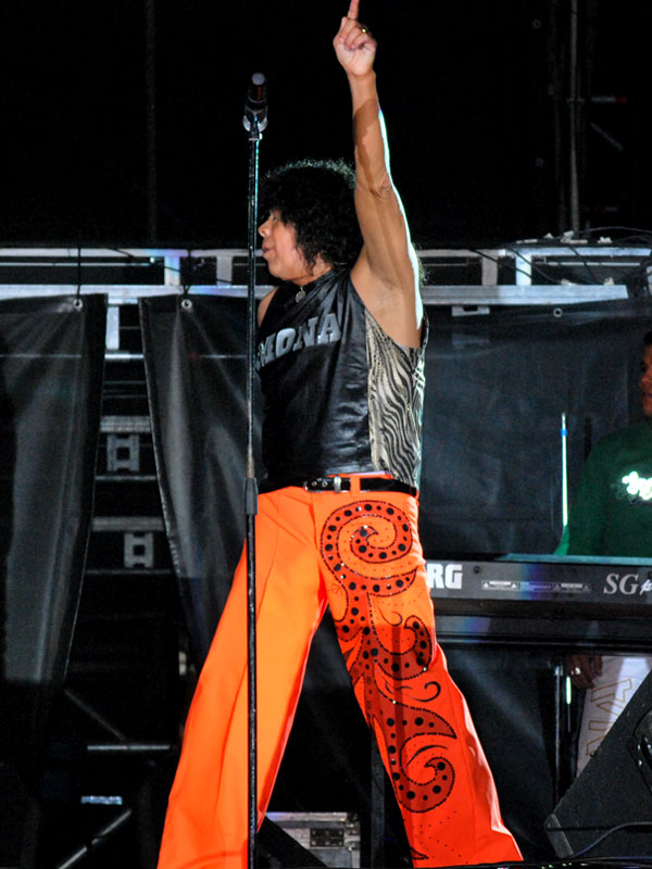 La Mona tiene carisma, magnetismo y energía. Mantuvo más de 40 mil personas coreando bailando sus temas en la fiesta por los 25 años del programa radial "Juntos", de Cadena 3 Córdoba.